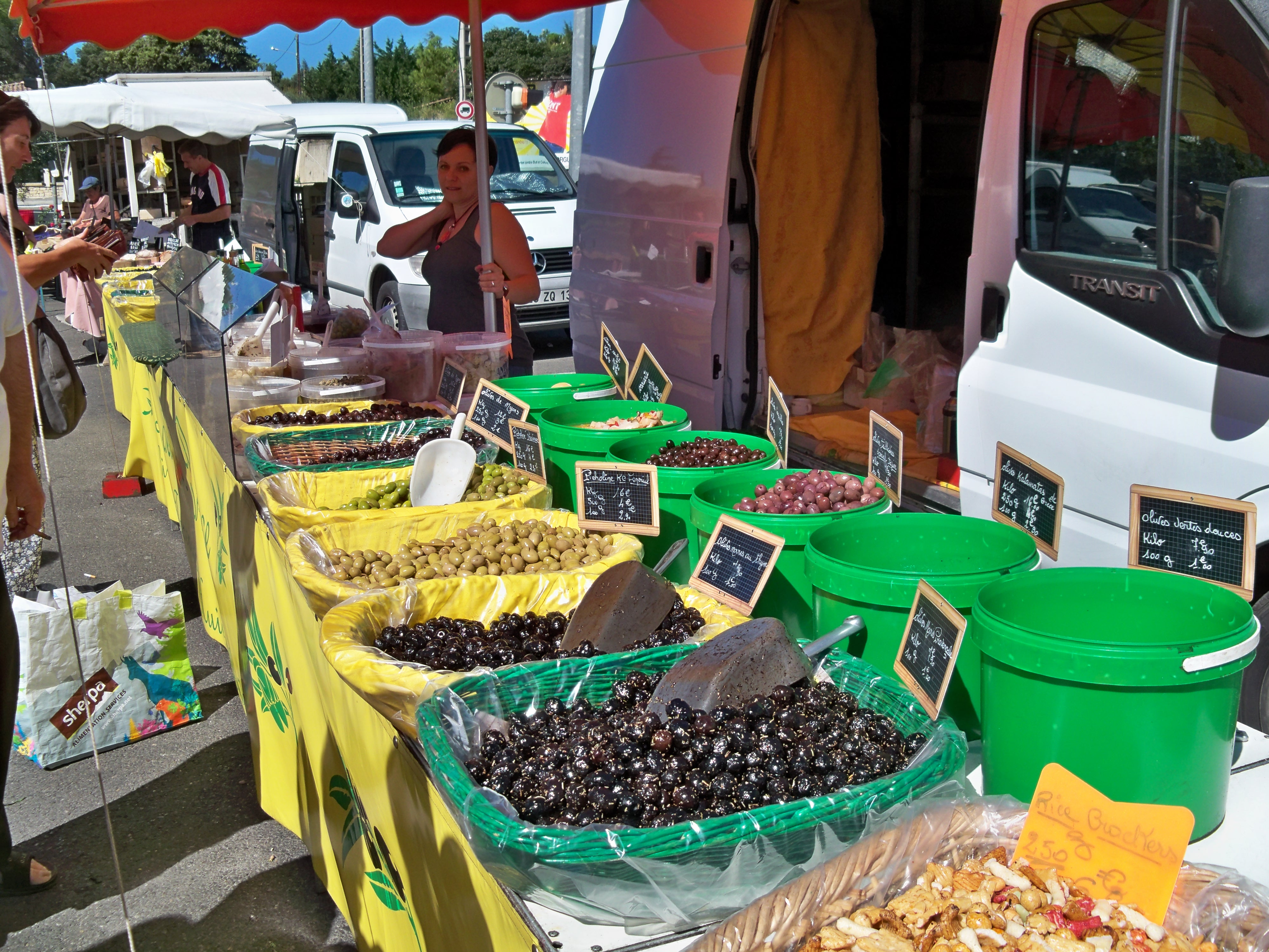 Ventes d'olives sur un marché gardois